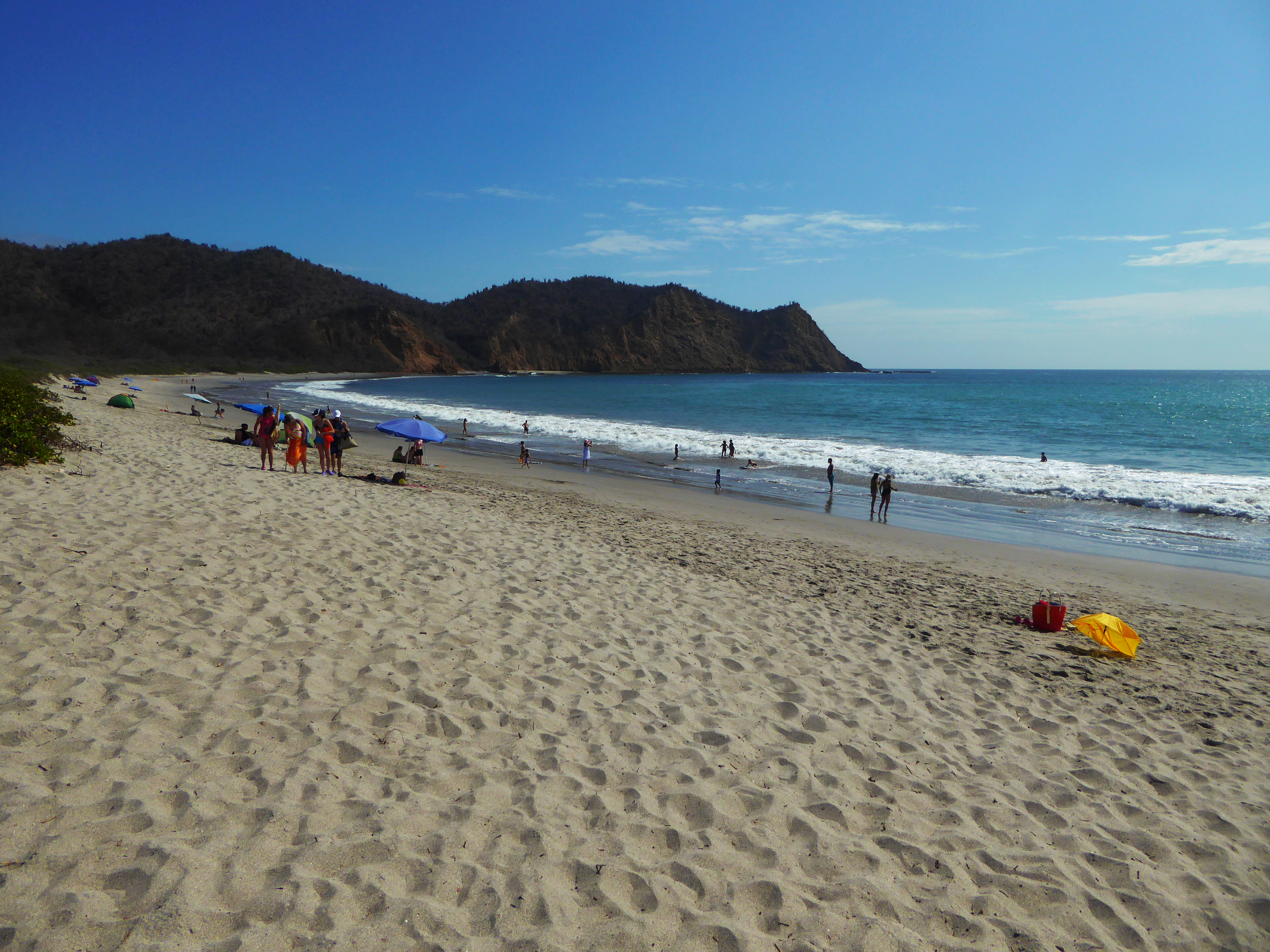 Strand im Machalilla National Park